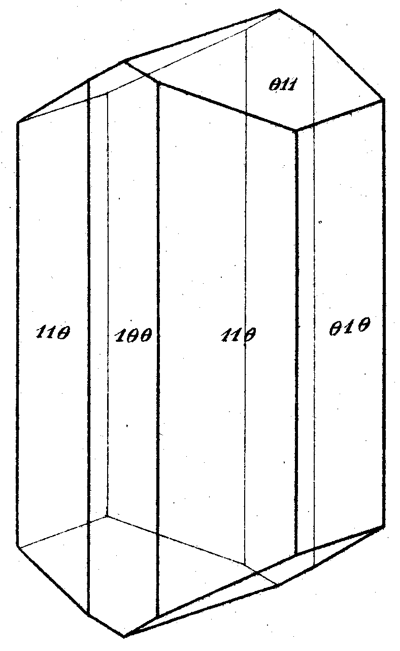 Krennerit kristály rajza